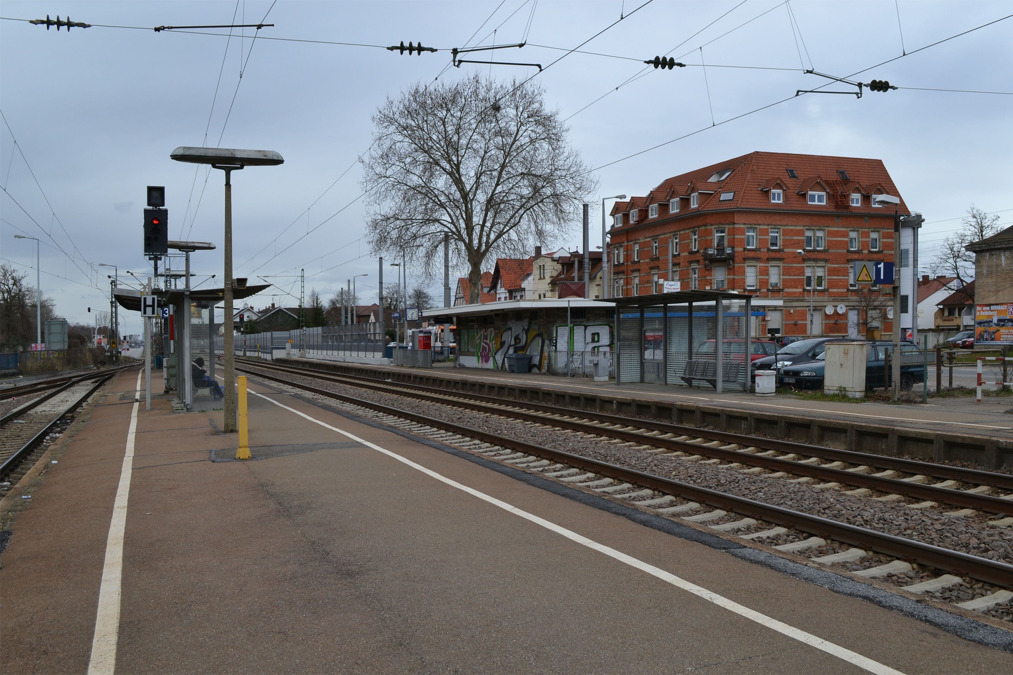 Bahnhof Mannheim-Rheinau im Februar 2014